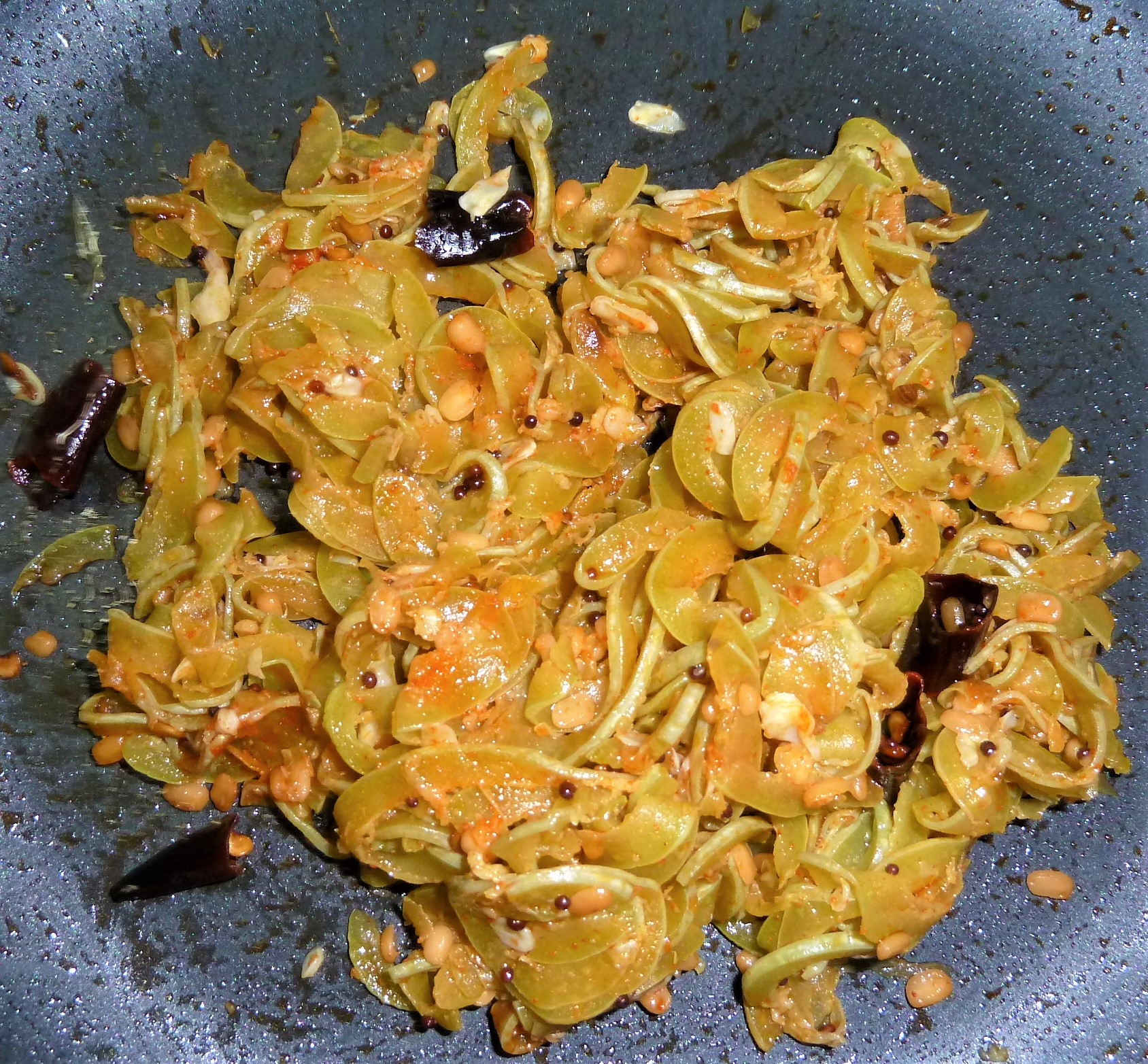 పొట్లకాయ పోపు కూర